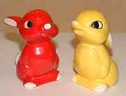 Salz- + Pfefferstreuer "Thumper" von Goebel